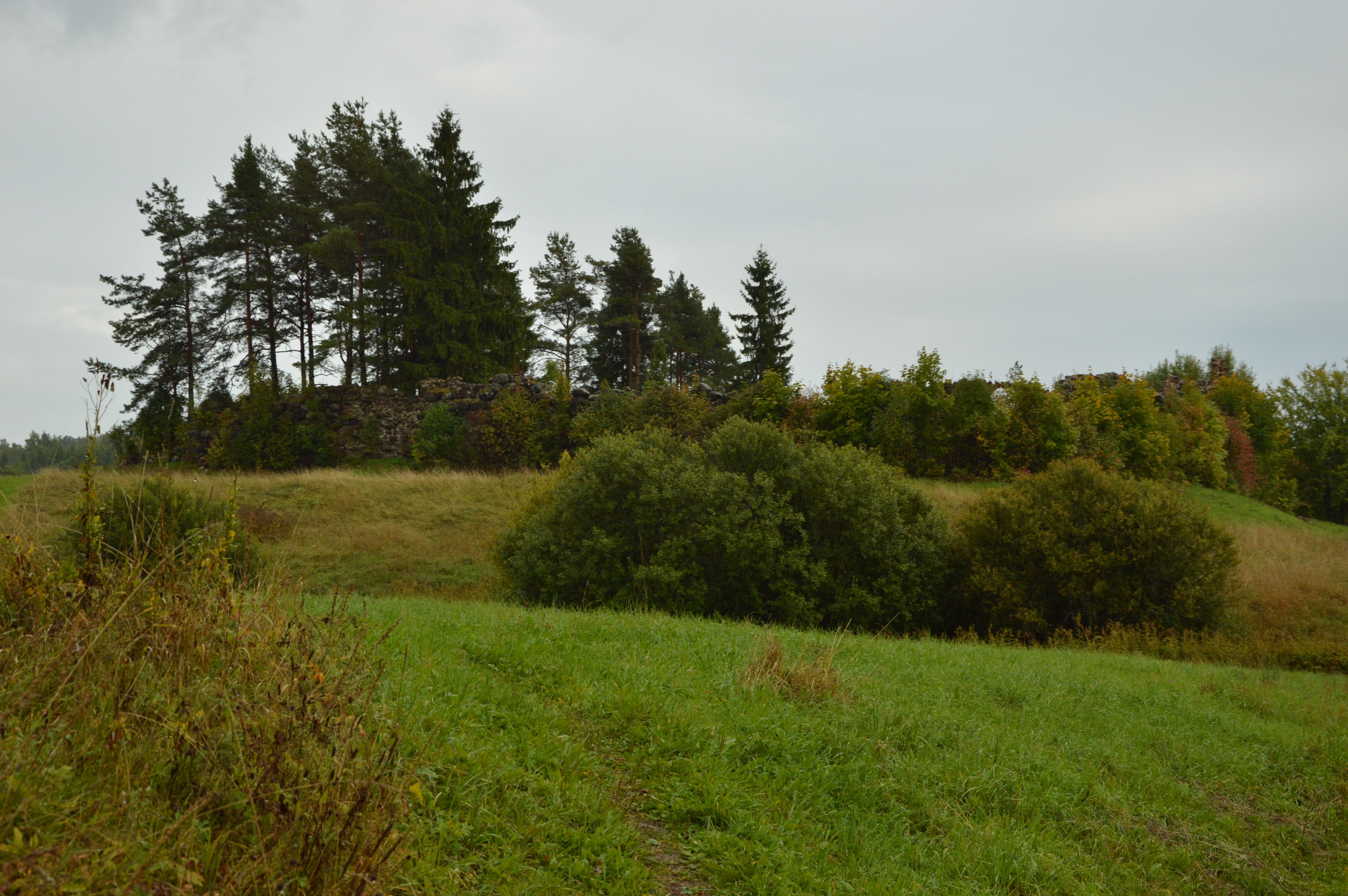 Vana-Pebalgi piiskopilinnus